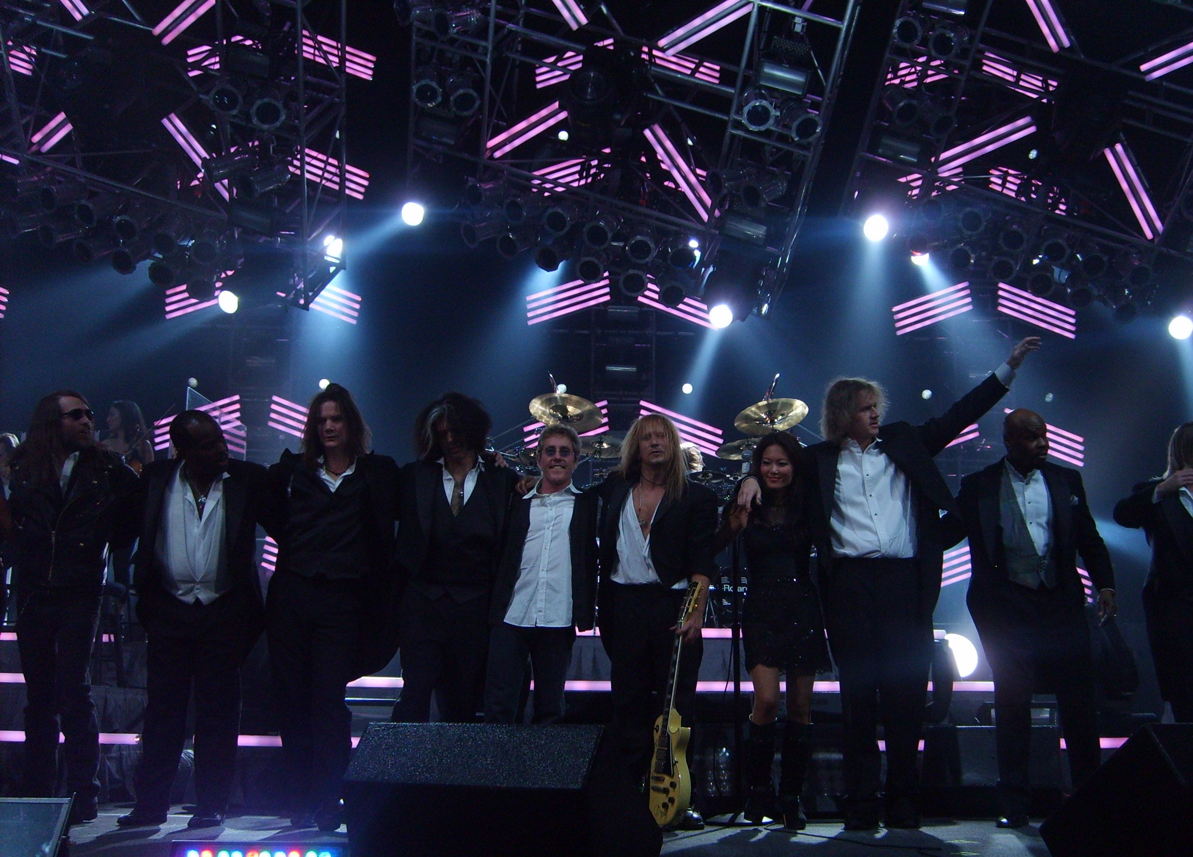 Trans-Siberian Orchestra